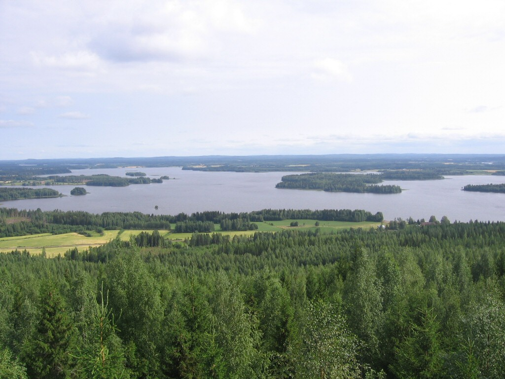 A view from the belvedere of Väisälänmäki (Lapinlahti, Finland)